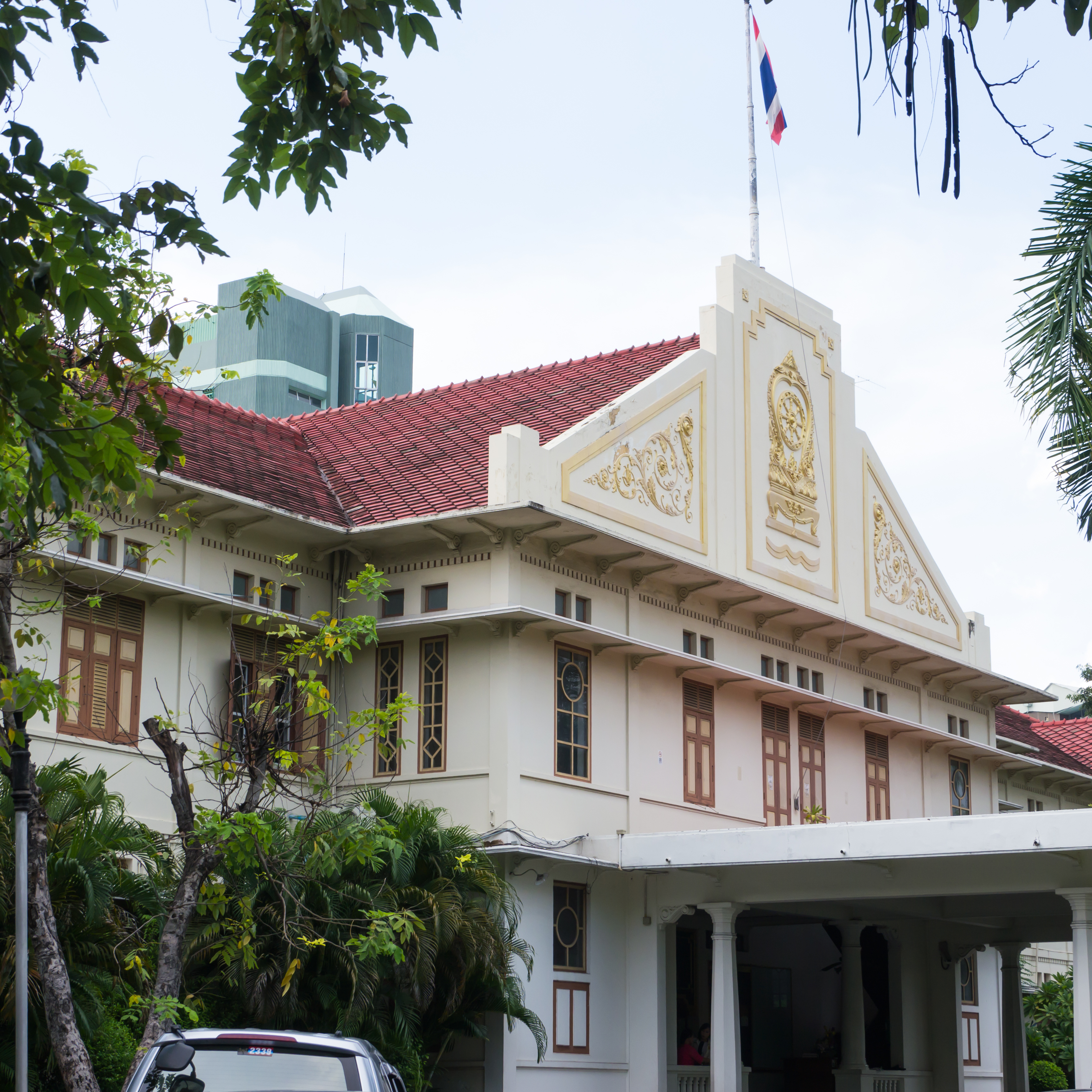 กระทรวงศึกษาธิการ(วังจันทรเกษม)